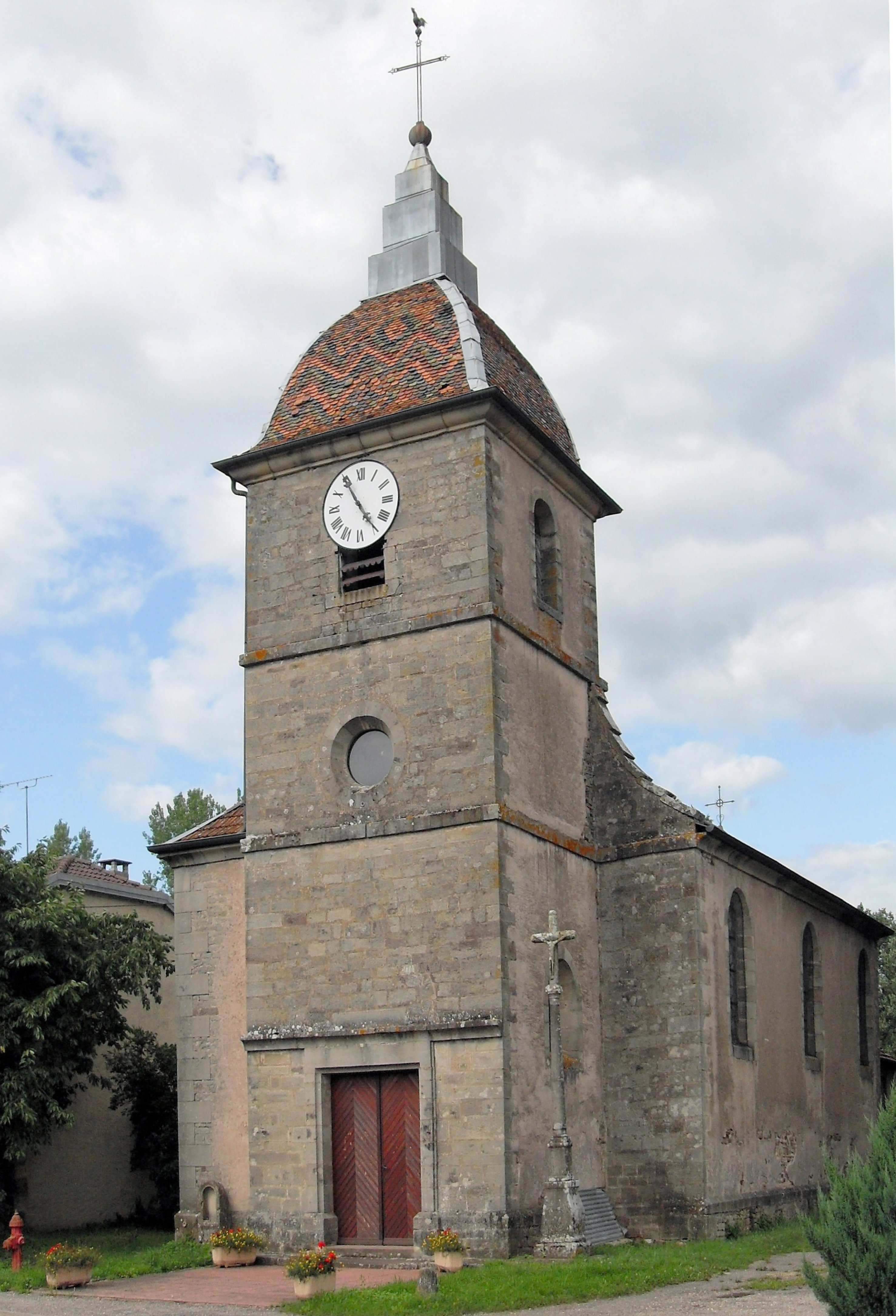 L'église Saint-Remi á Cuve